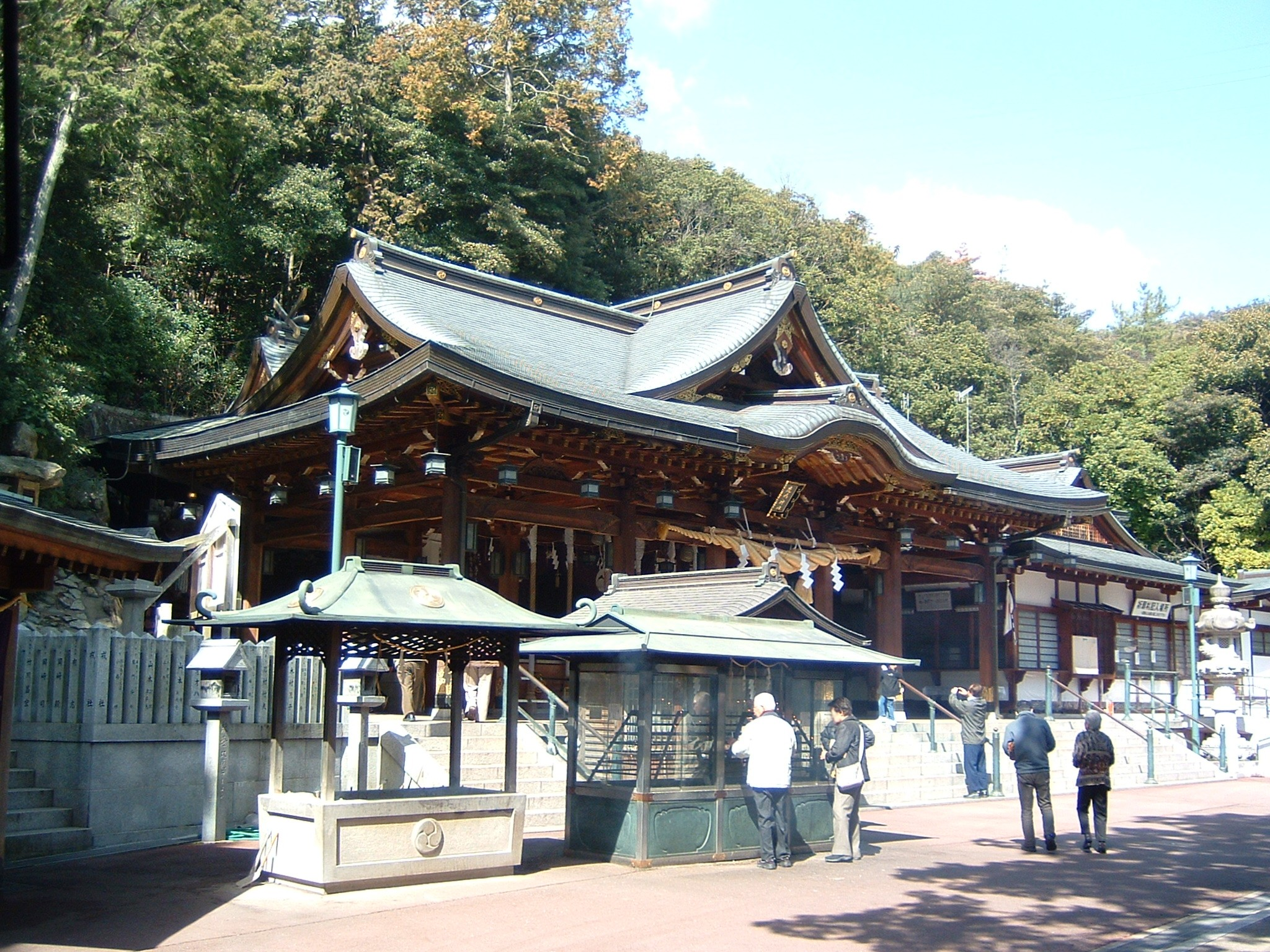 Kashima jinja（鹿嶋神社 (高砂市)）